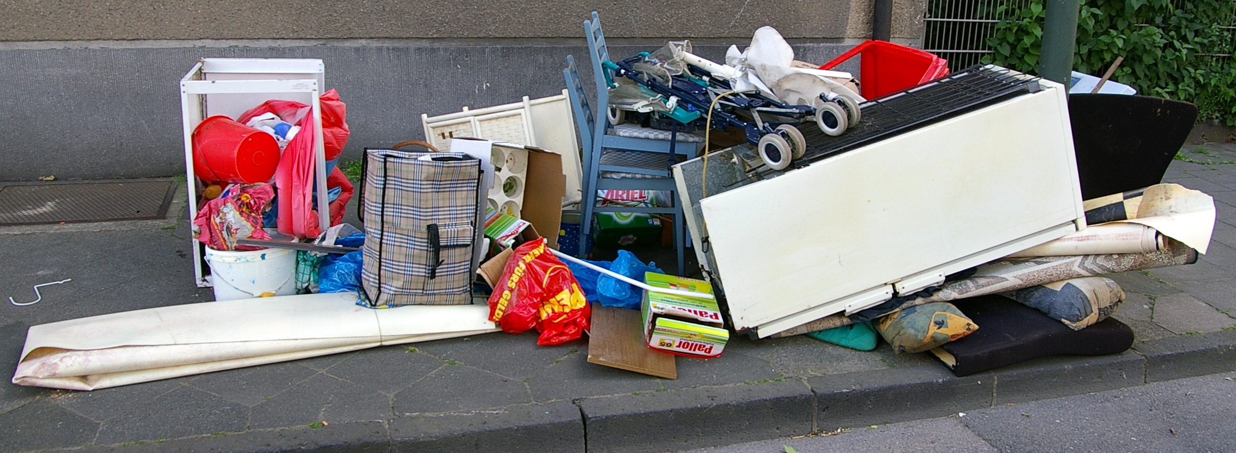 Sperrmüll in der Mindener Straße in Düsseldorf